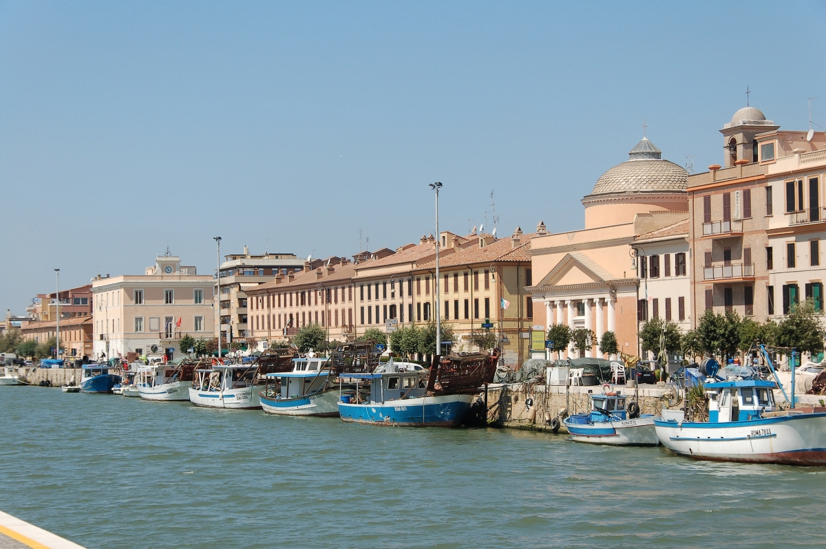 Fiumicino 2011 Durch die Übernahme der UMTS Kosten durch den gemeinnützigen Vereins Skillshare.eu konnte dieses Bild bereitstellen werden. Skillshare e.V. ist ein eingetragener gemeinnütziger Verein zur Förderung der Bildung durch Unterstützung der Erstellung, Sammlung und Verbreitung so genannten freien Wissens. IBAN: DE16 8306 5408 0004 8850 66 BIC: GENODEF1SLR Bank: VR-Bank Altenburger Land